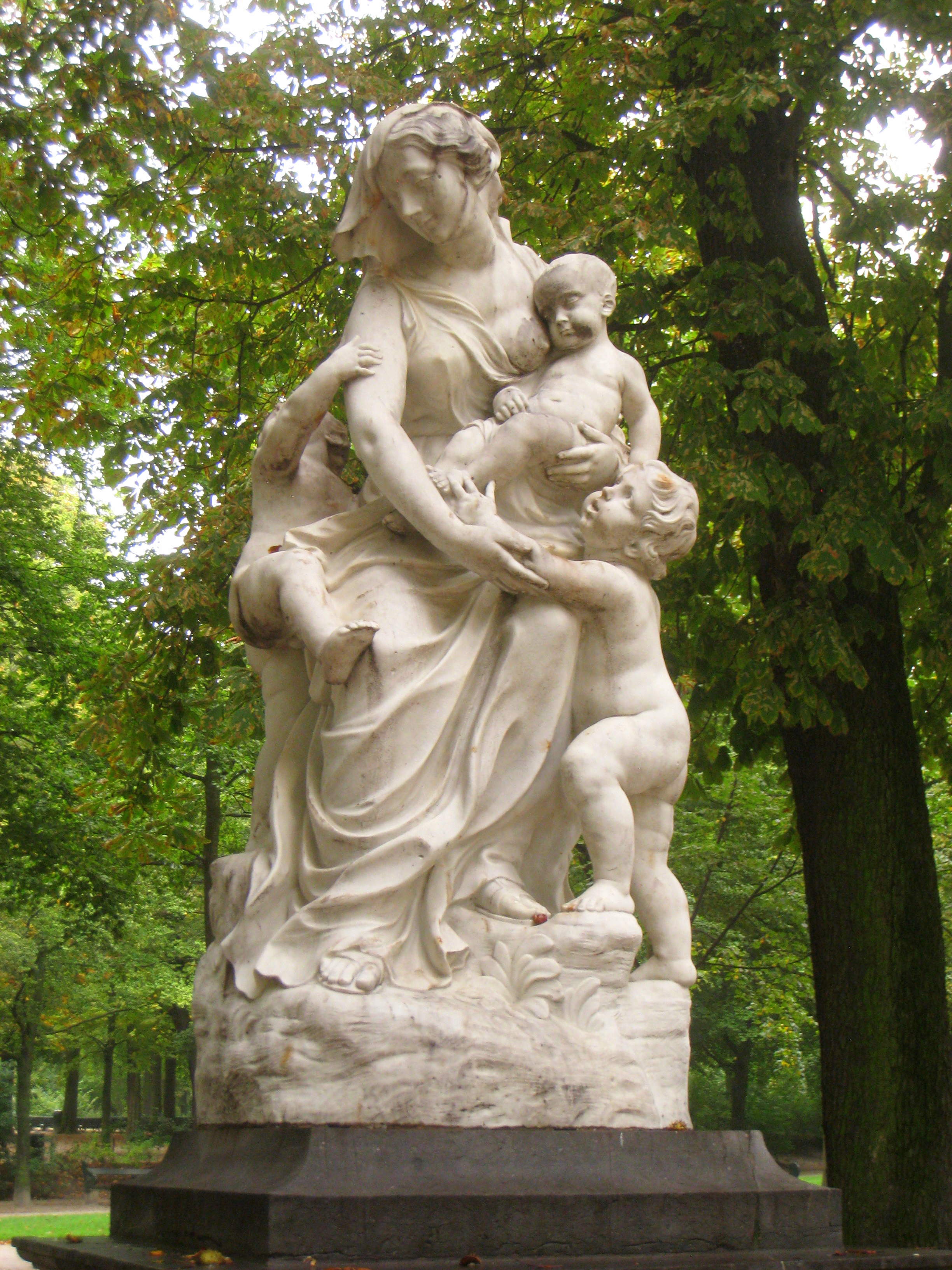 Statue in Brussels Park, Brussels, Belgium.